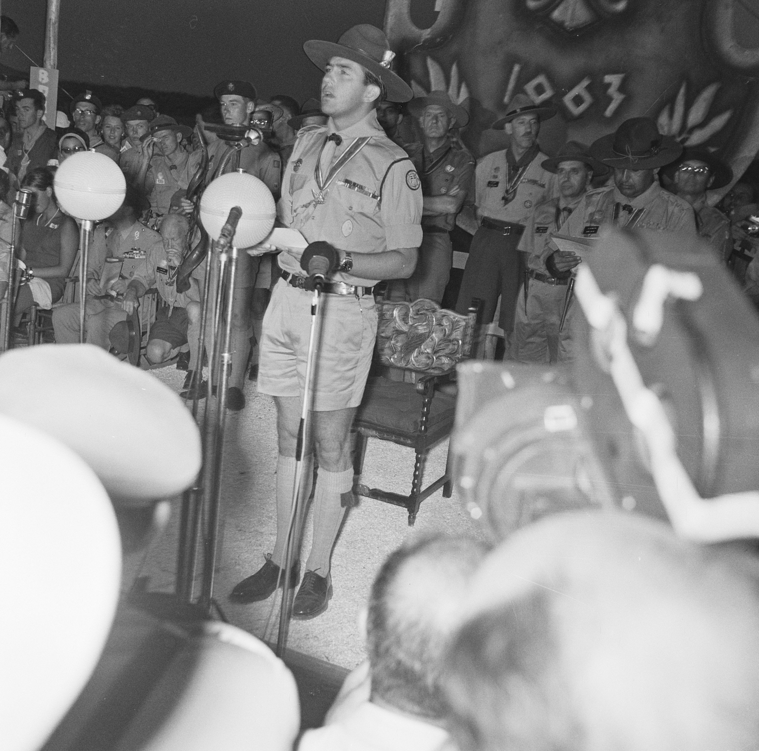 Collectie / Archief : Fotocollectie Anefo Reportage / Serie : [ onbekend ] Beschrijving : Jamboree 1963 te Marathon Griekenland. Openingsrede prins Constantijn Datum : 12 augustus 1963 Locatie : Griekenland Trefwoorden : openingsredes Persoonsnaam : Constantijn, prins van Griekenland Fotograaf : Nijs, Jac. de / Anefo Auteursrechthebbende : Nationaal Archief Materiaalsoort : Negatief (zwart/wit) Nummer archiefinventaris : bekijk toegang 2.24.01.03 Bestanddeelnummer : 915-4265